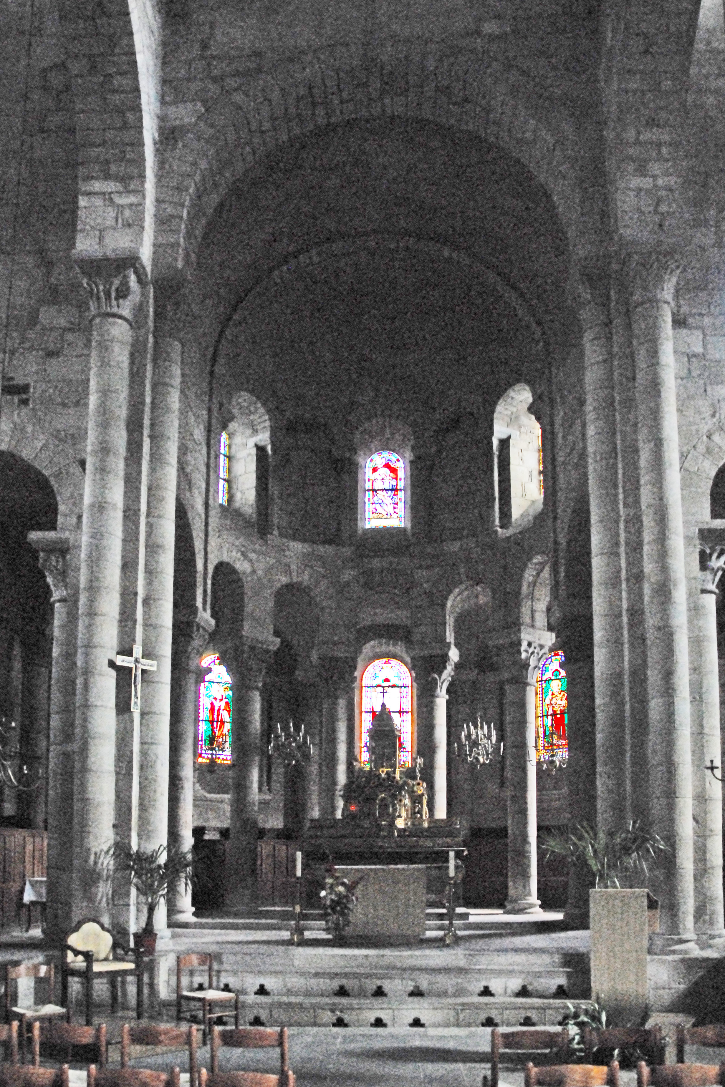 St-Saturnin (Puy-de-Dôme), Chor aus Vierung